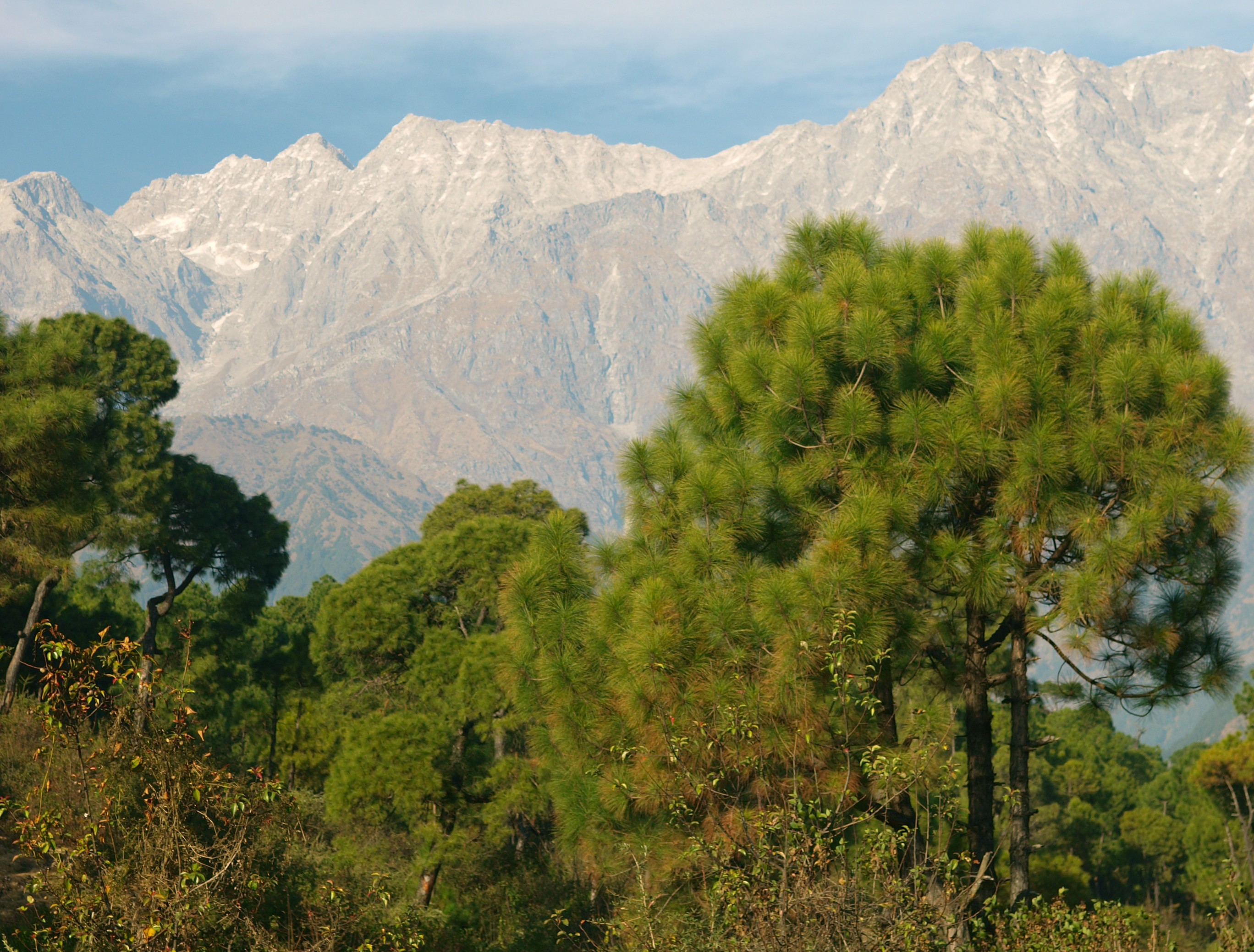 Pinus roxburghii trees, near Dharamsala, NW India